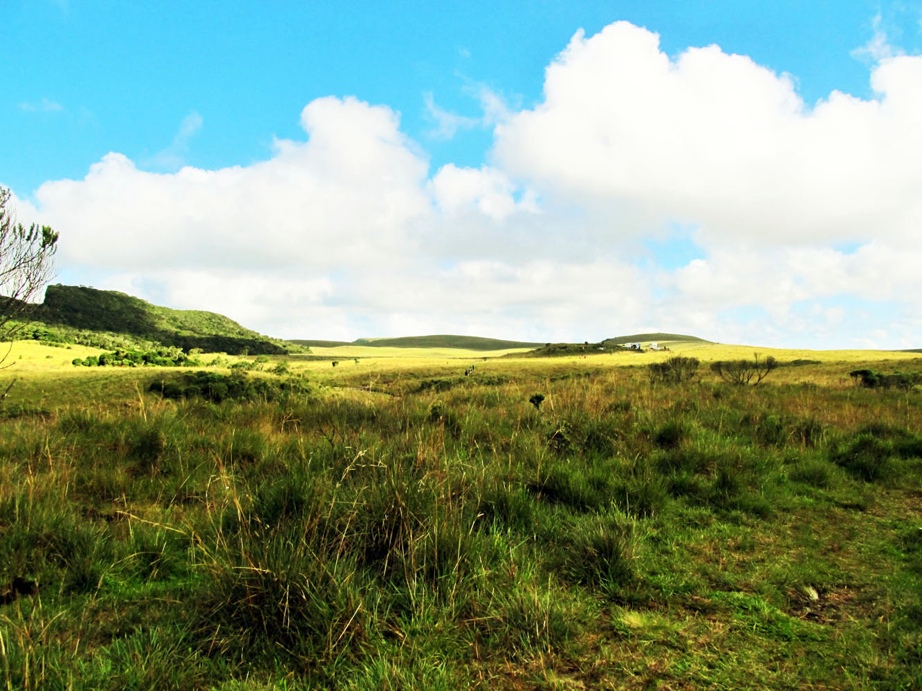 Vegetação característica dos campos de cima da serra, no Parque Nacional de Aparados da Serra, Nordeste do Rio Grande do Sul.